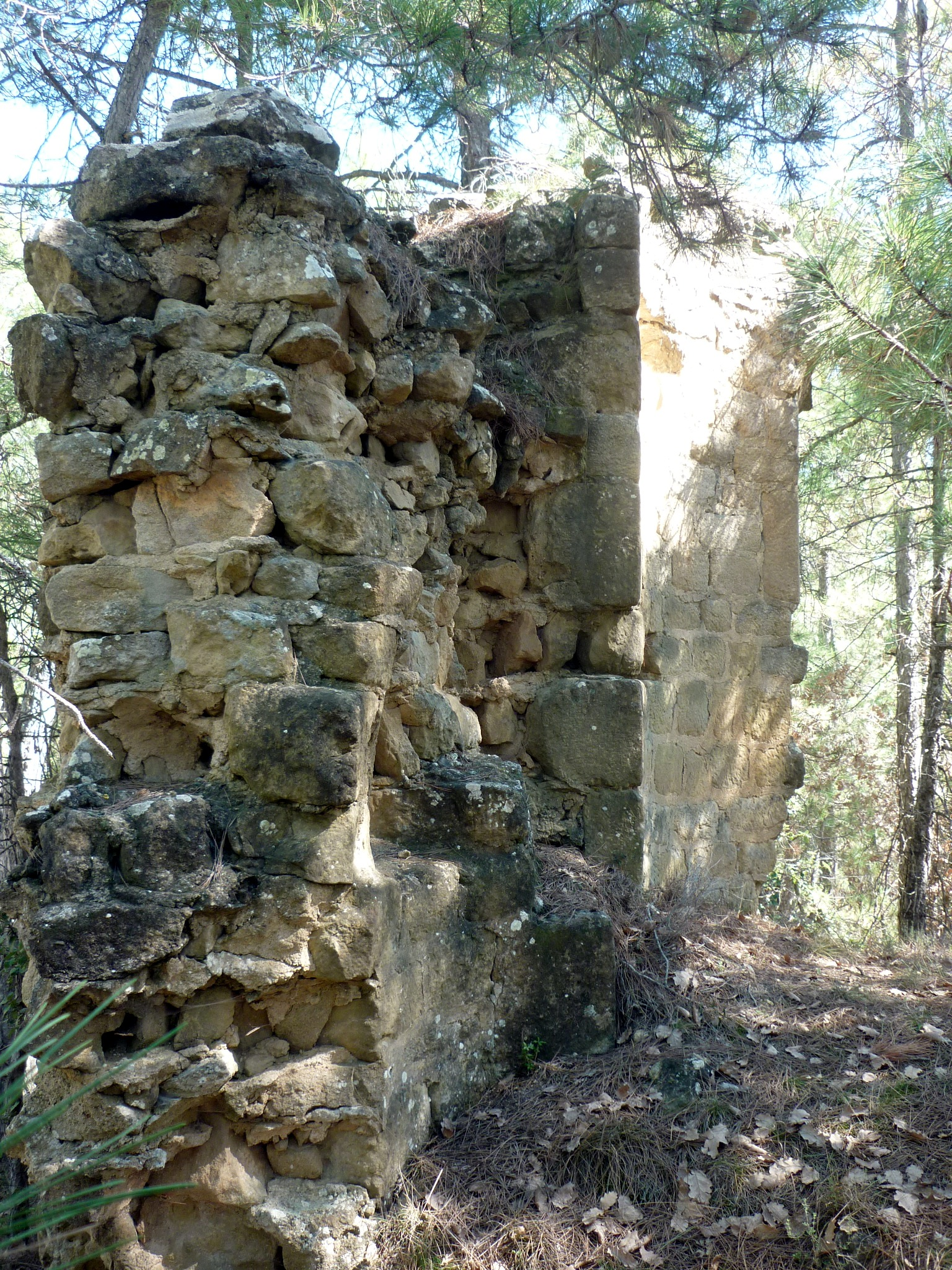 Antiga capella de Sant Ermengol (Pinell de Solsonès)